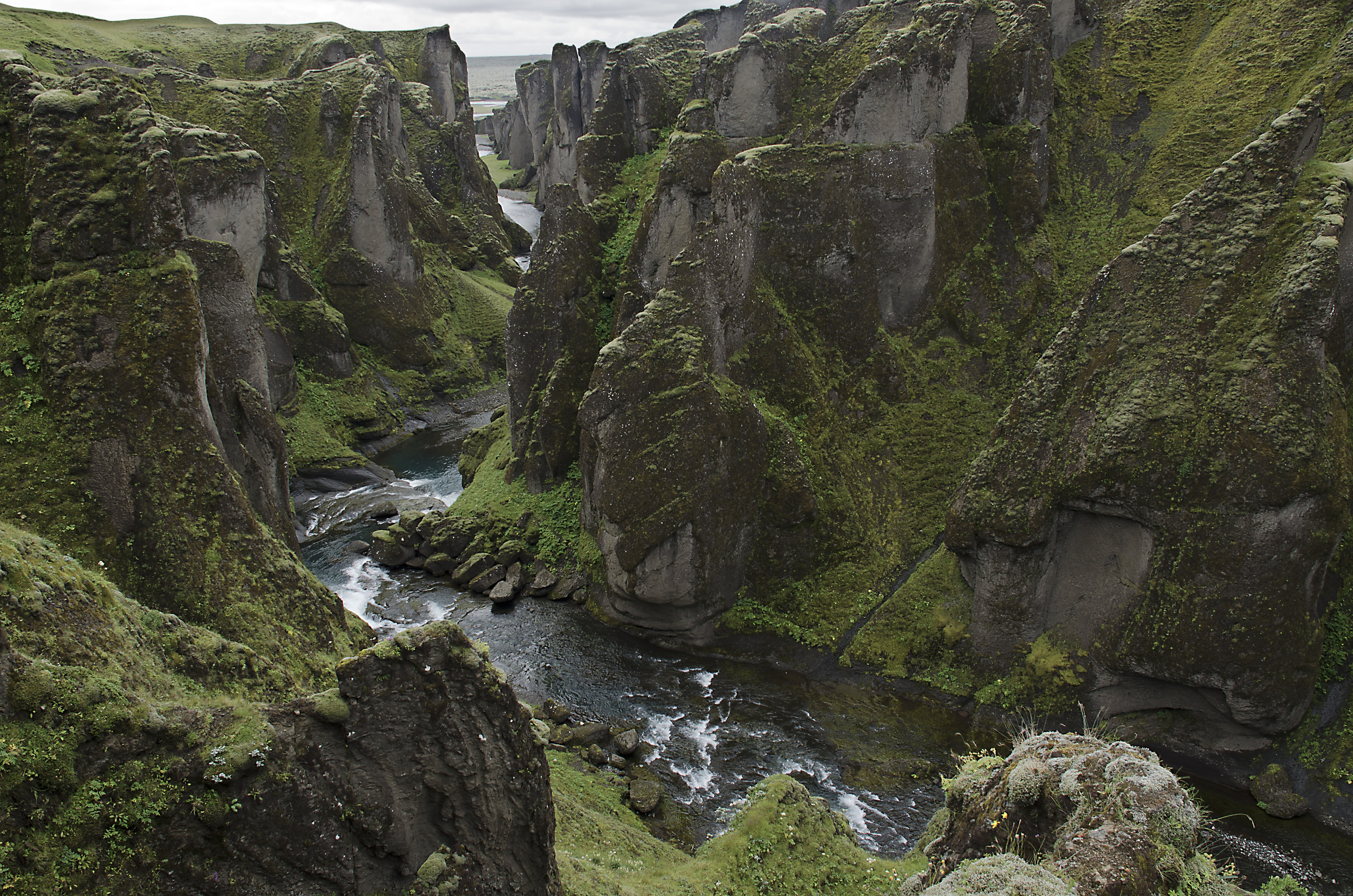 Fjaðrárgljúfur canyon near Kirkjubaejarklaustur, Iceland